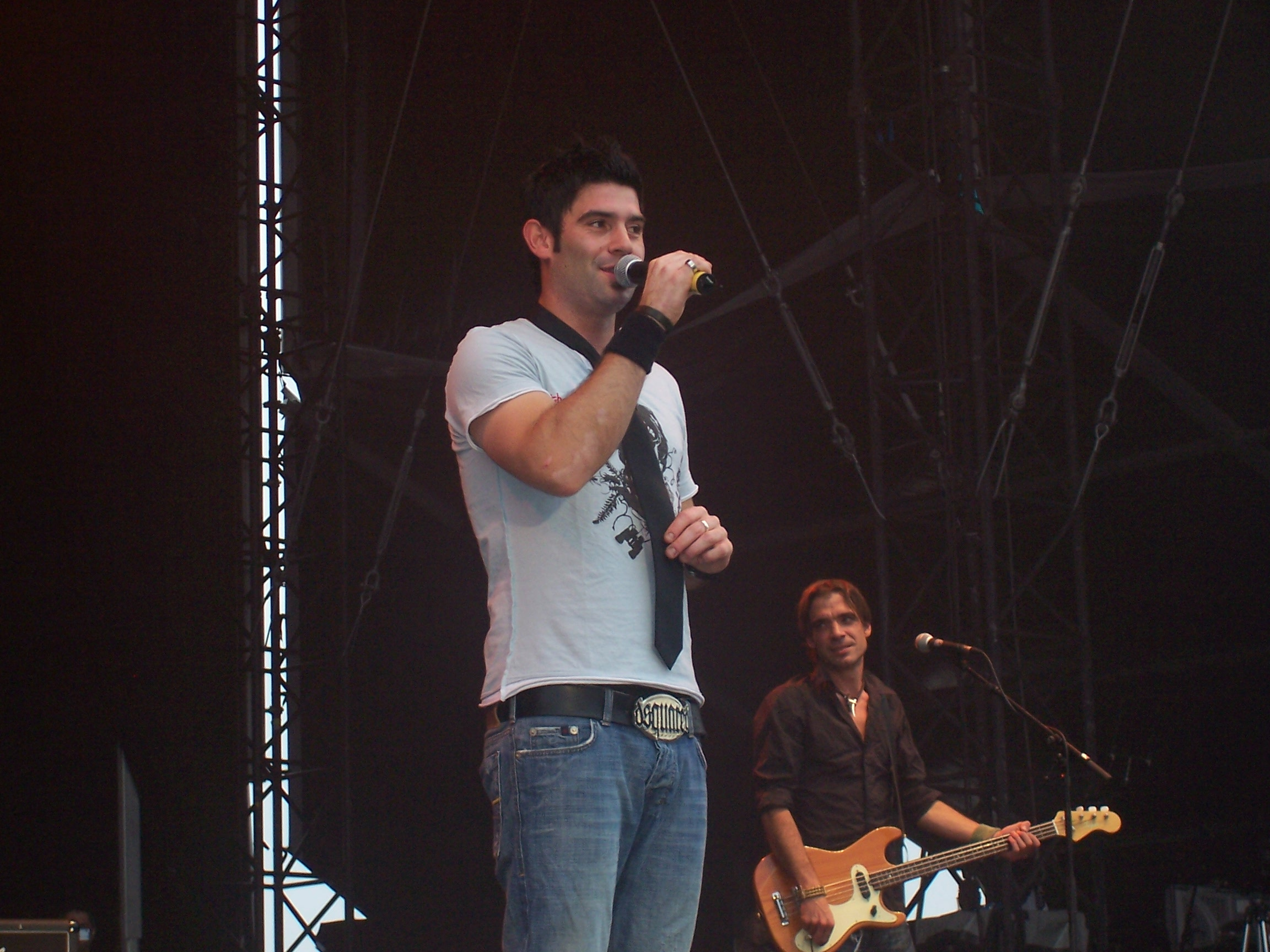 Beeld tijdens concert op de "Hessentag 2007" in Duitsland